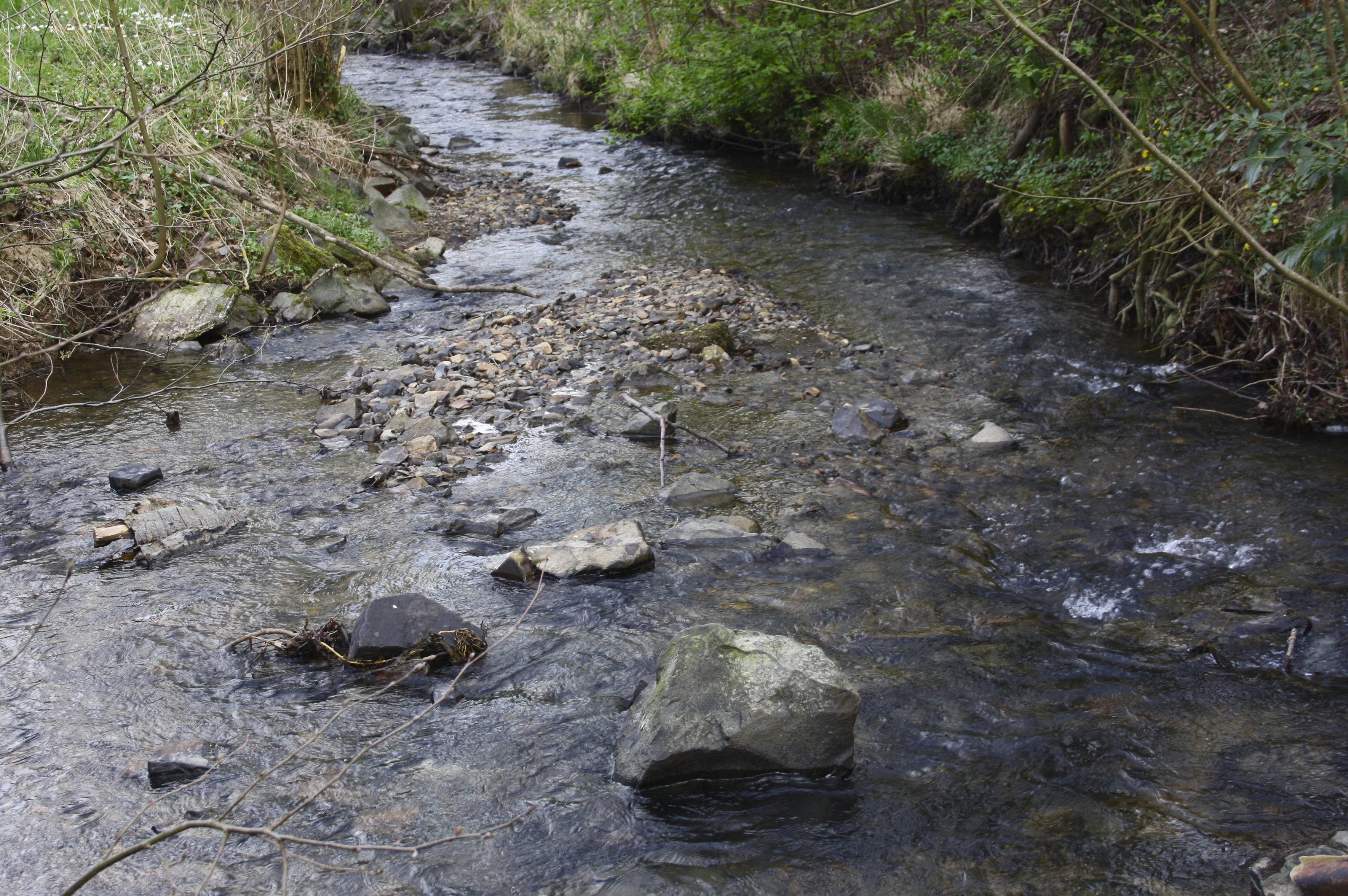 Stadtbach (Gelbach) in Montabaur, Westerwaldkreis, Rheinland-Pfalz, Deutschland